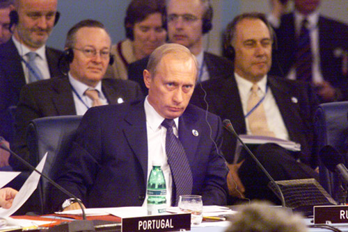 ПРАТИКА-ДИ-МАРЕ (база ВВС Италии). На заседании саммита Россия–НАТО.